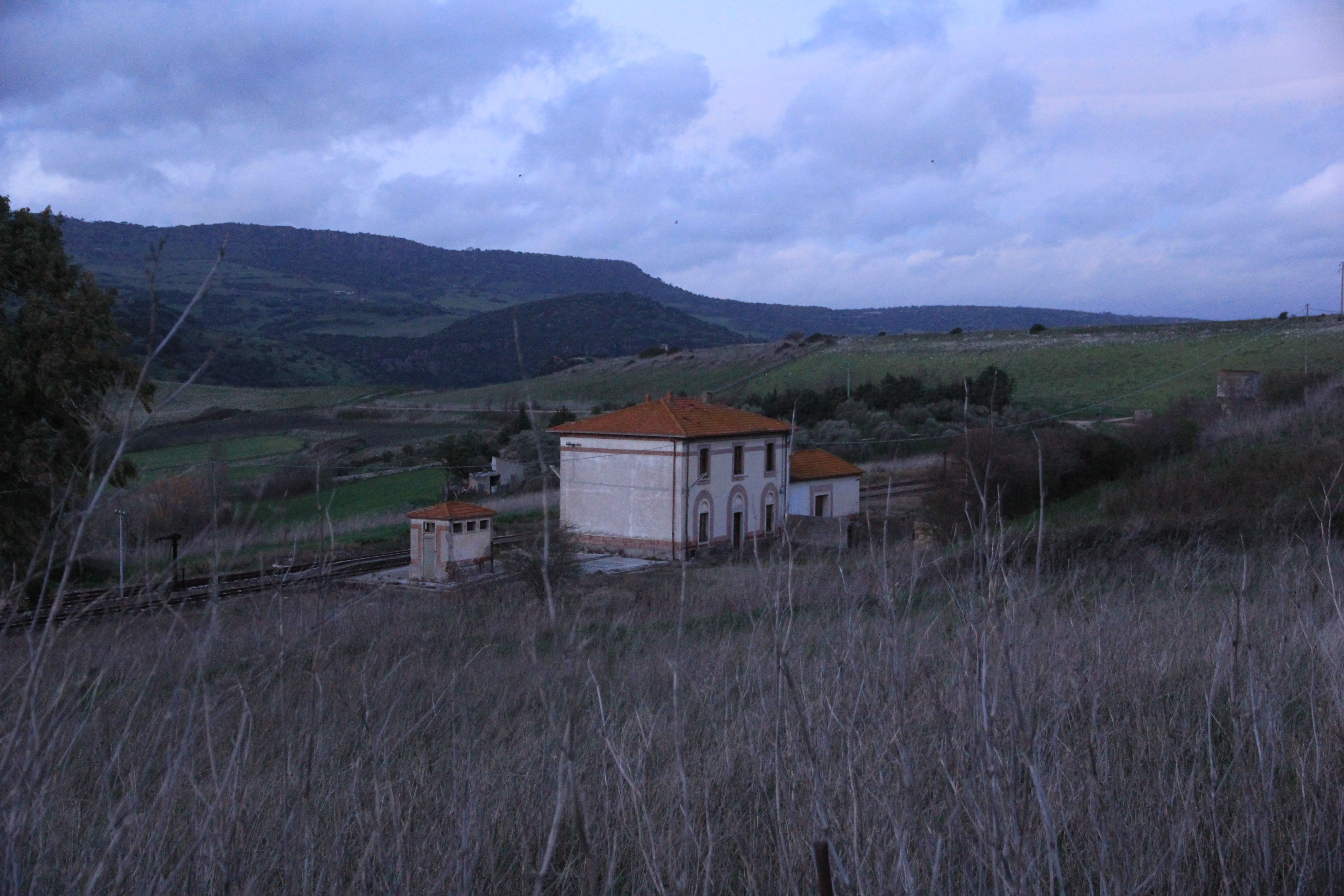 Martis - Stazione ferroviaria